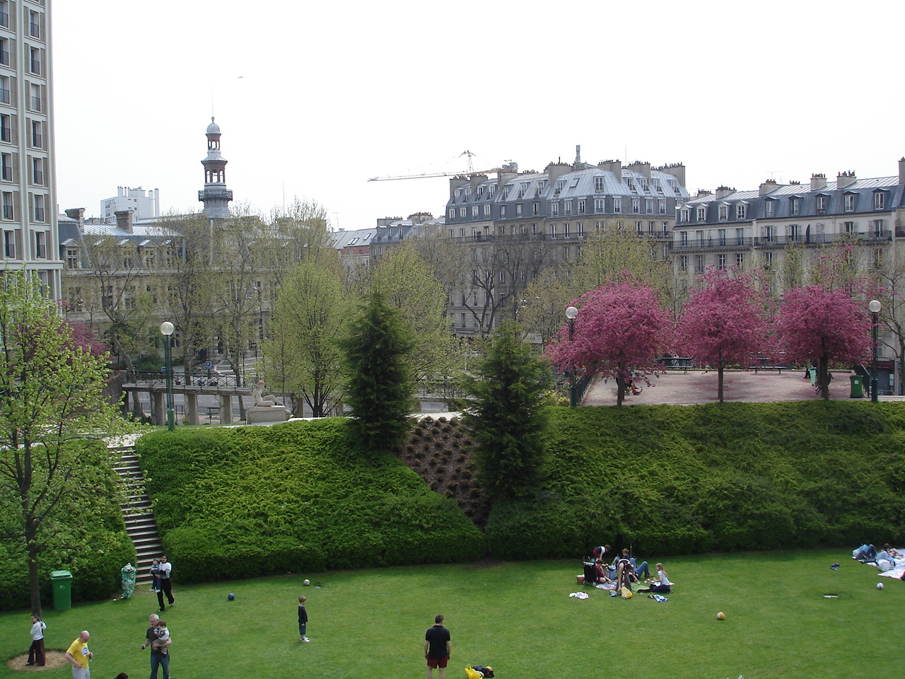 Paris Mairie du XIIe vue de la Promenade plantée.